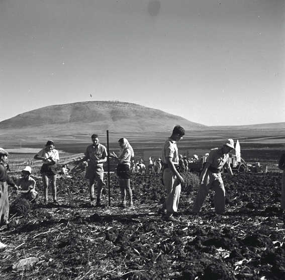 דברת - ישוב חדש בצל התבור - הקמת גדר התיל.